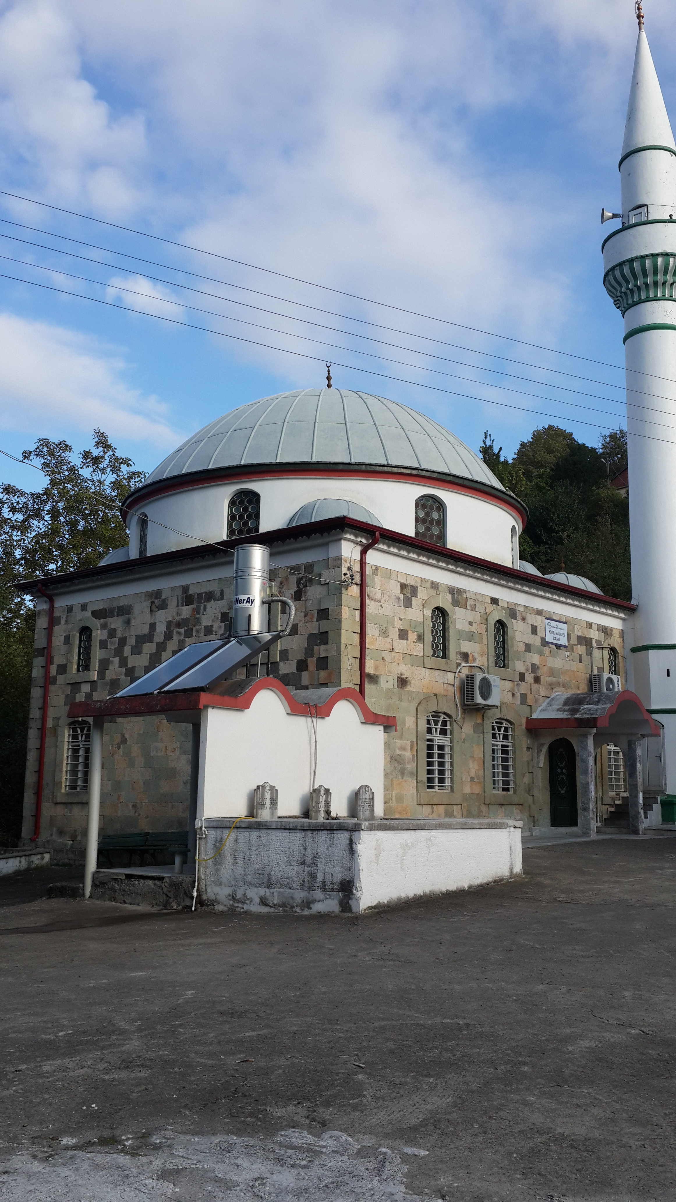 Deli Ahmet Ağa’nın konağının tabanındaki taşlardan yapılan Yemişli Cami